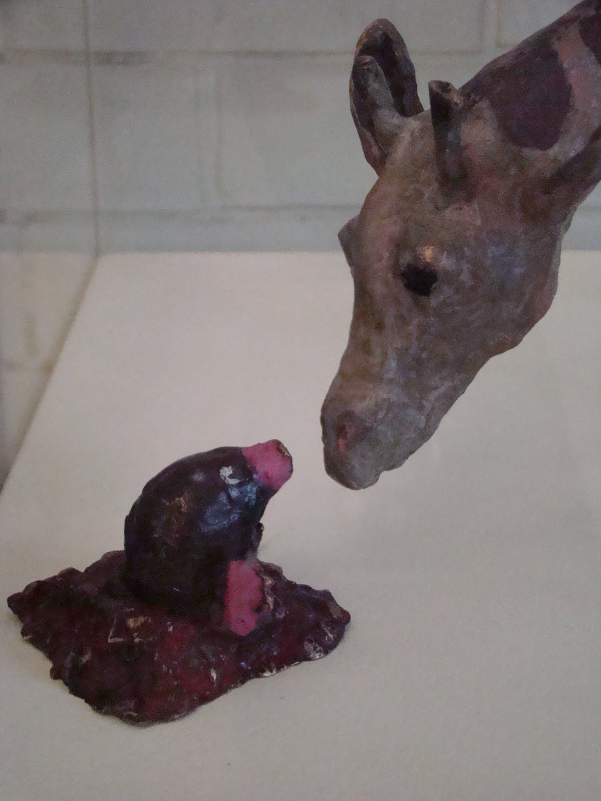 Bronze peint